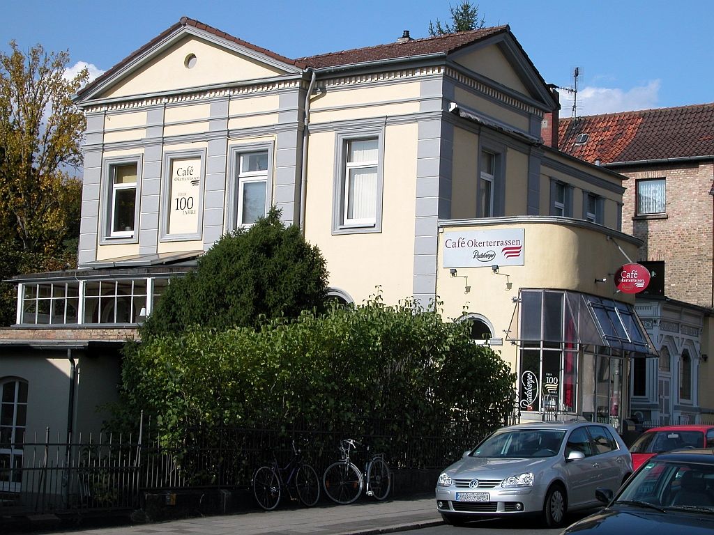 Braunschweig, Parkstraße 11, Café Okerterrassen: Ansicht von Südosten.